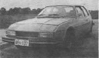 FSO Ogar